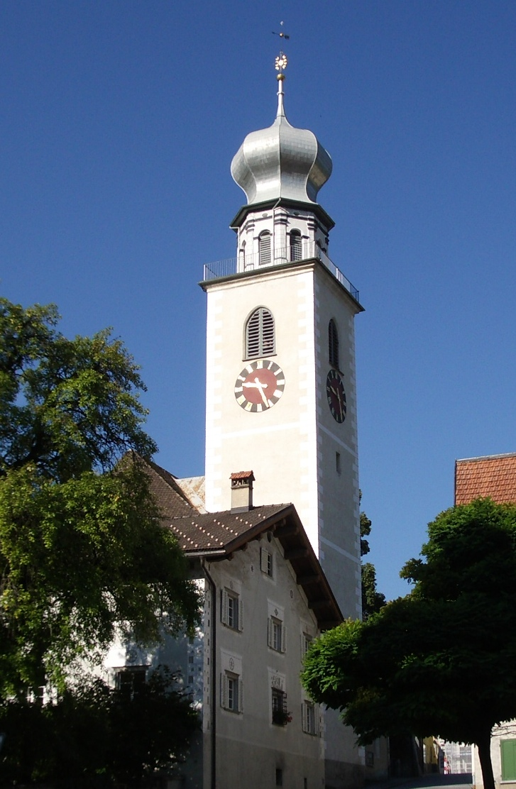 Thusis GR, Switzerland